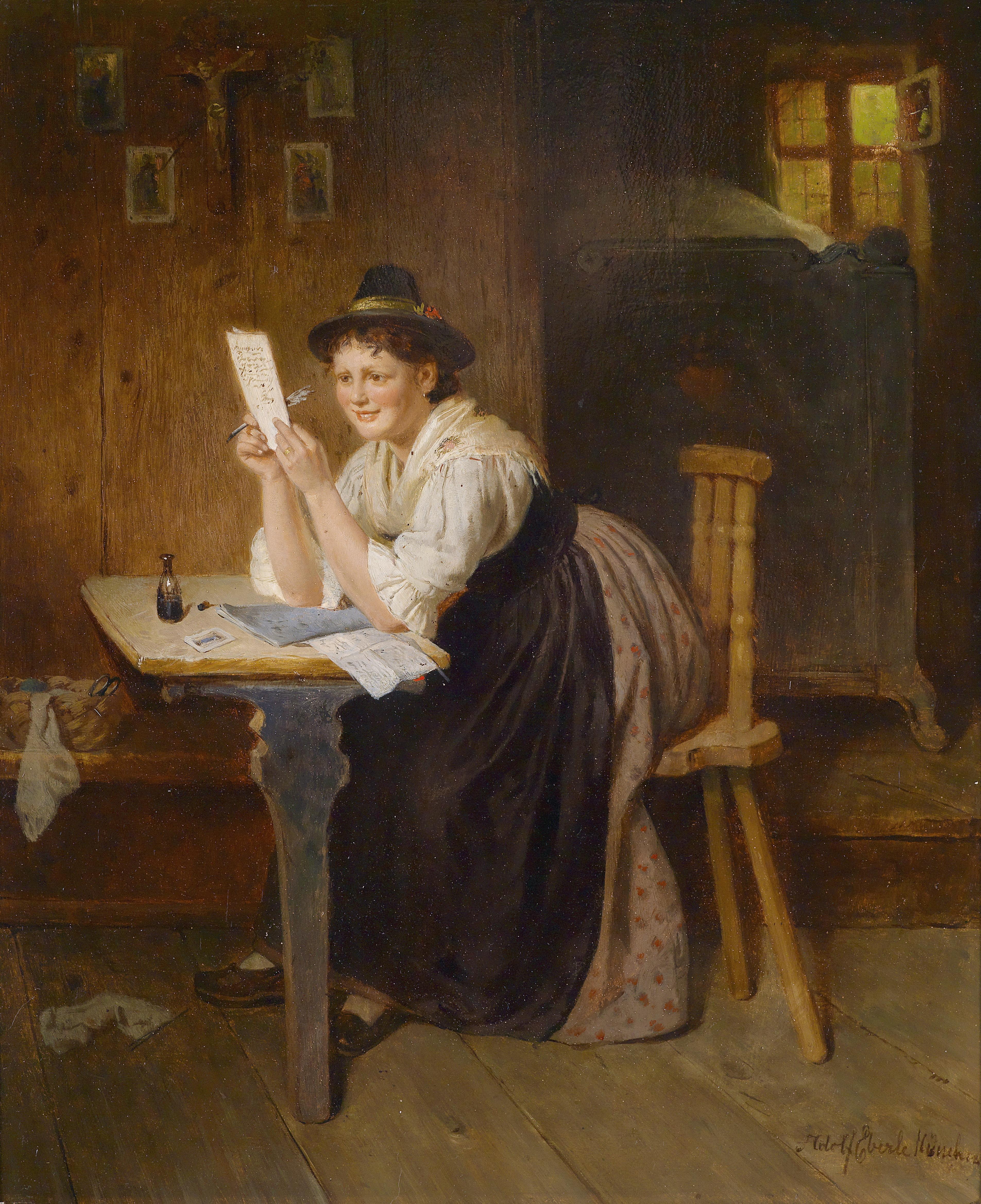 Der gelunge Brief